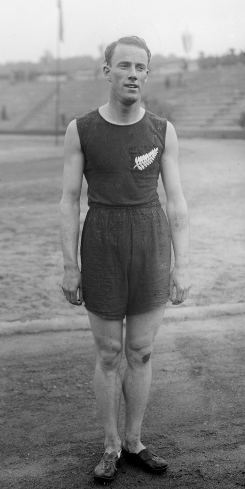 [Harold E.] Wilson, New-Zealand, 110 m haies [3ème aux Jeux interalliés] : [photographie de presse] / [Agence Rol]